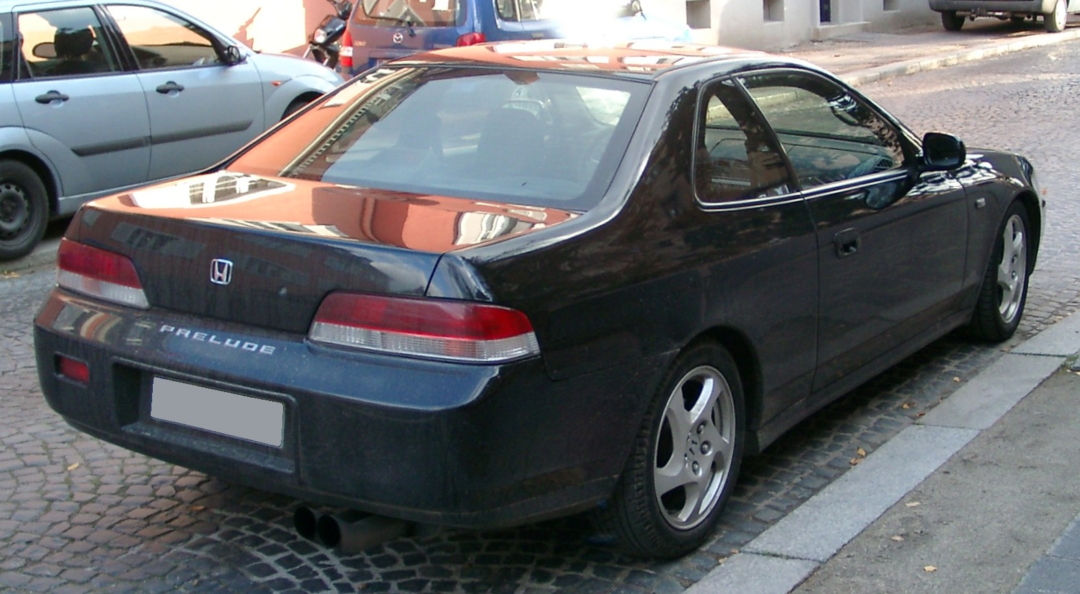 Honda Prelude (5. Generation)